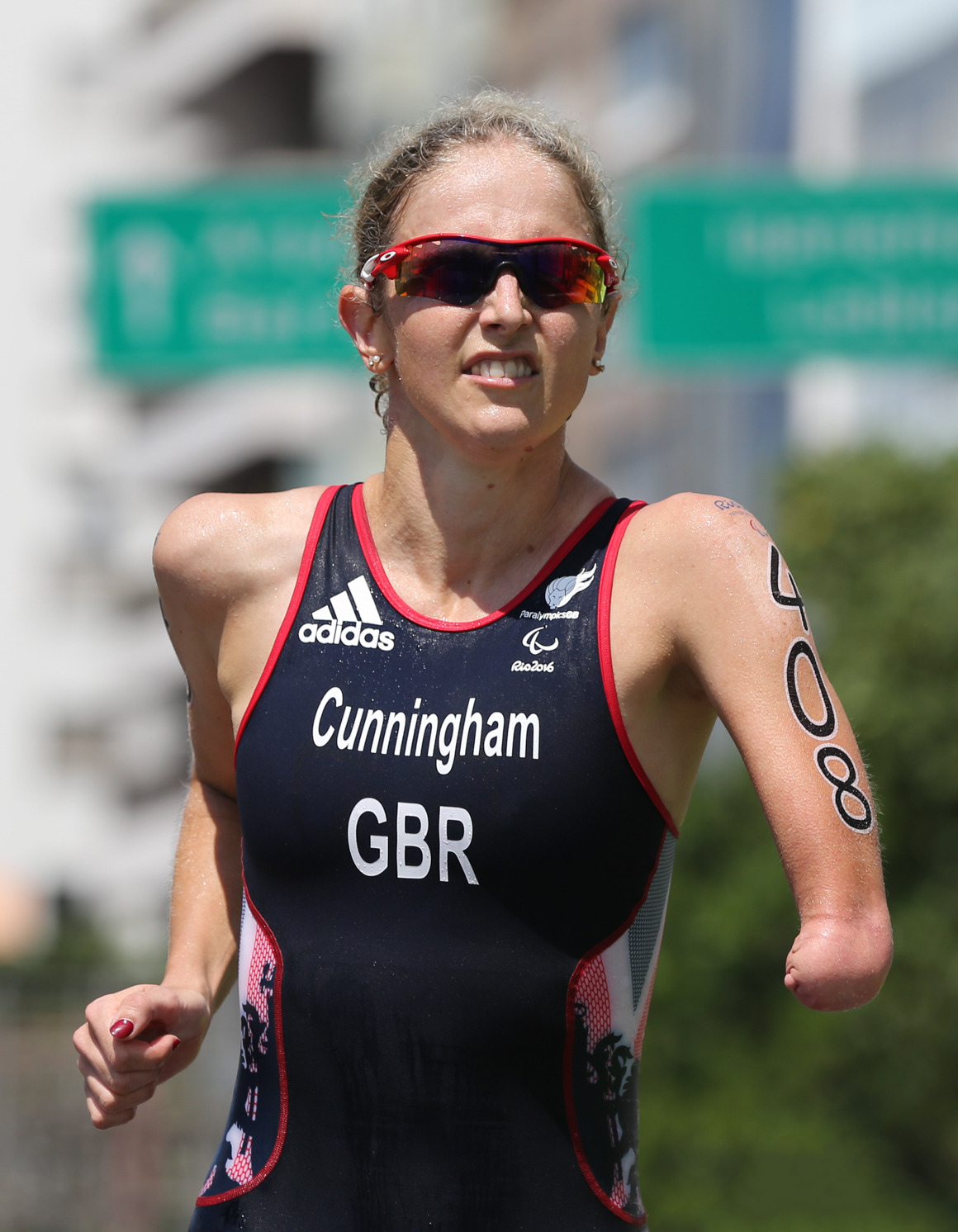 Rio de Janeiro - Provas de triatlo feminino PT4, PT2 e PT5, em Copacabana. Competição da categoria PT5. (Tânia Rêgo/Agência Brasil)